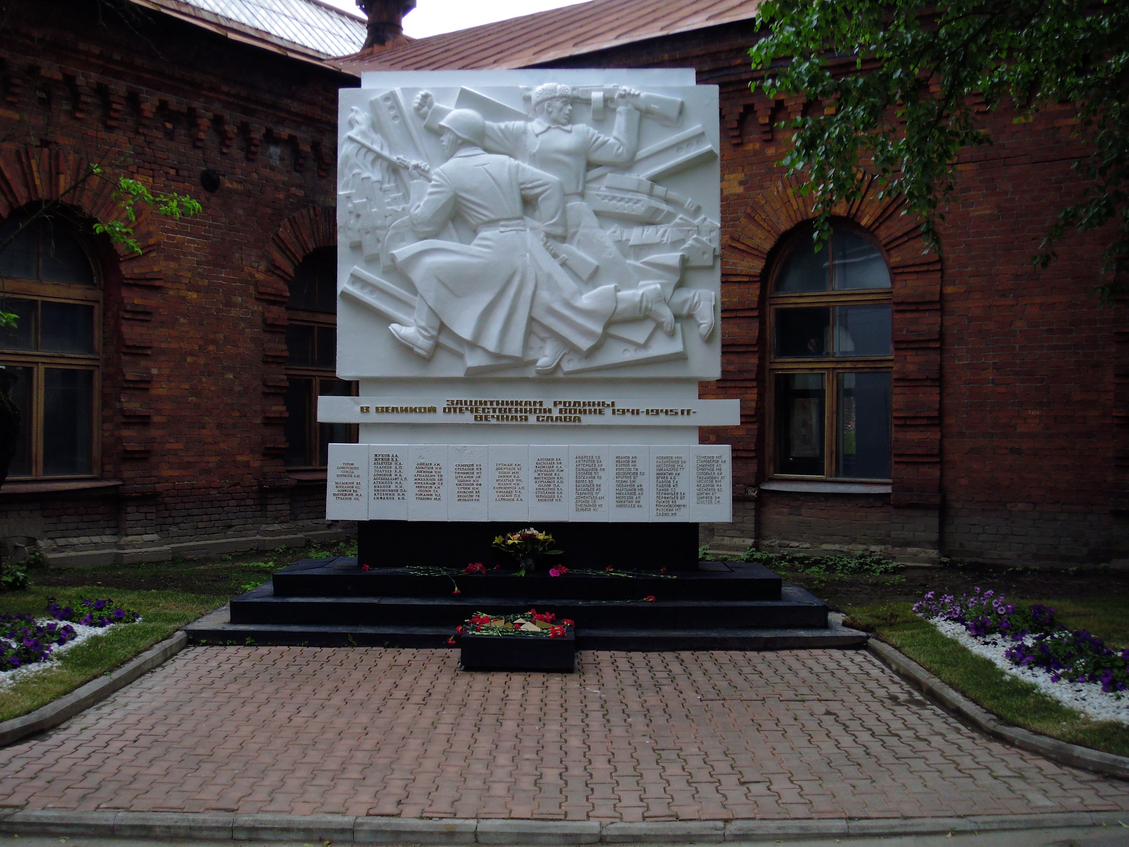 Сестрорецк. Петровский Арсенал. Цех № 14. Памятник культурно-исторического наследия регионального уровня охраны КГИОП СПб. Состояние на 2014 год.